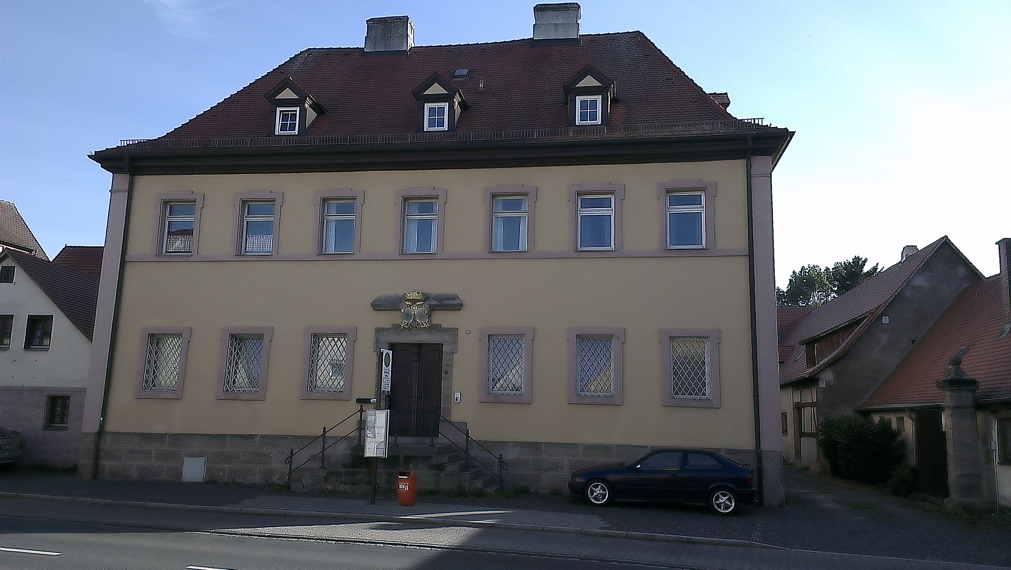 Seckendorff Eggloffsteinsches Freihaus in Nürnberg Kornburg – Ansicht von Nord